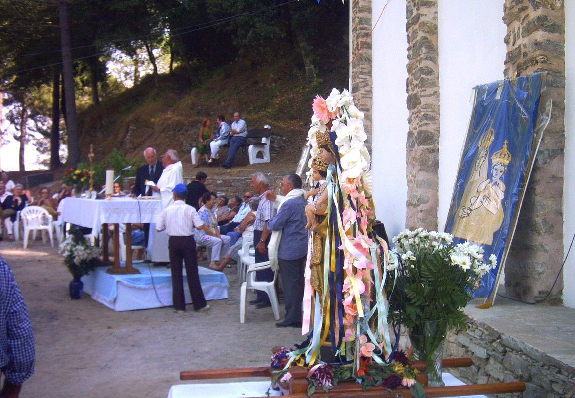 La préparation de la célébration du 8 septembre à Notre-Dame de Pancheraccia.